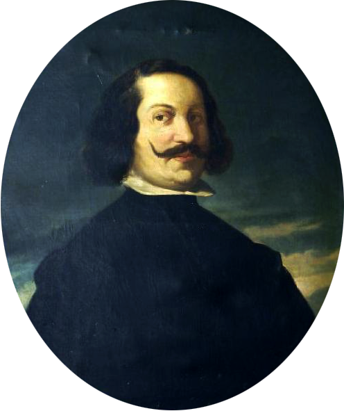 El pintor y escultor español Juan de Valdés Leal (1622-1680), en un retrato de Manuel Cabral y Aguado conservado en la Galería de Sevillanos Ilustres de la Universidad de Sevilla.